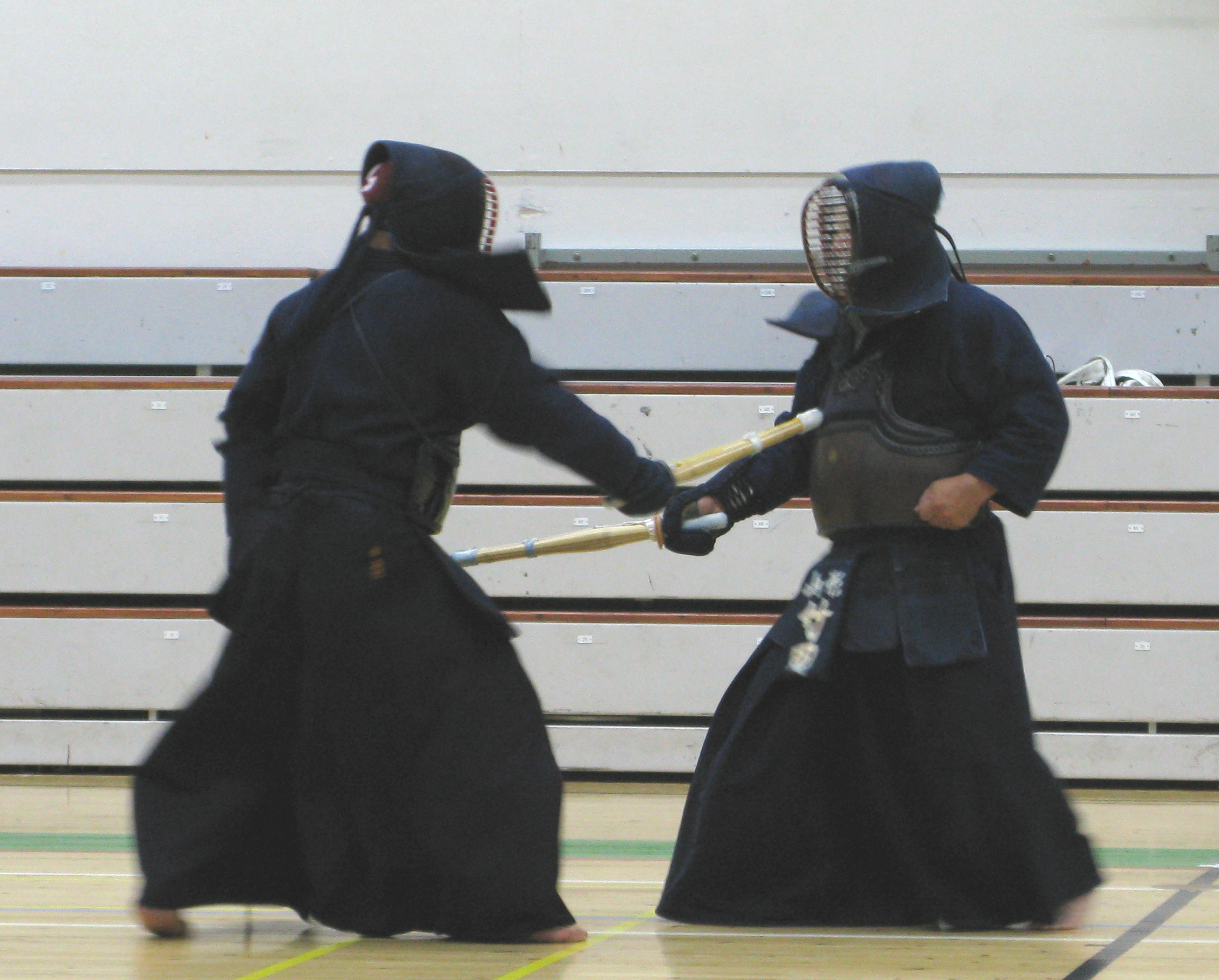 Tankendon pisto solarpleksukseen